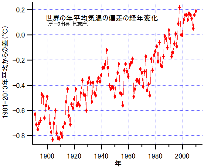 世界の年平均気温の偏差の経年変化 データ出典：気象庁 グラフ： データ：